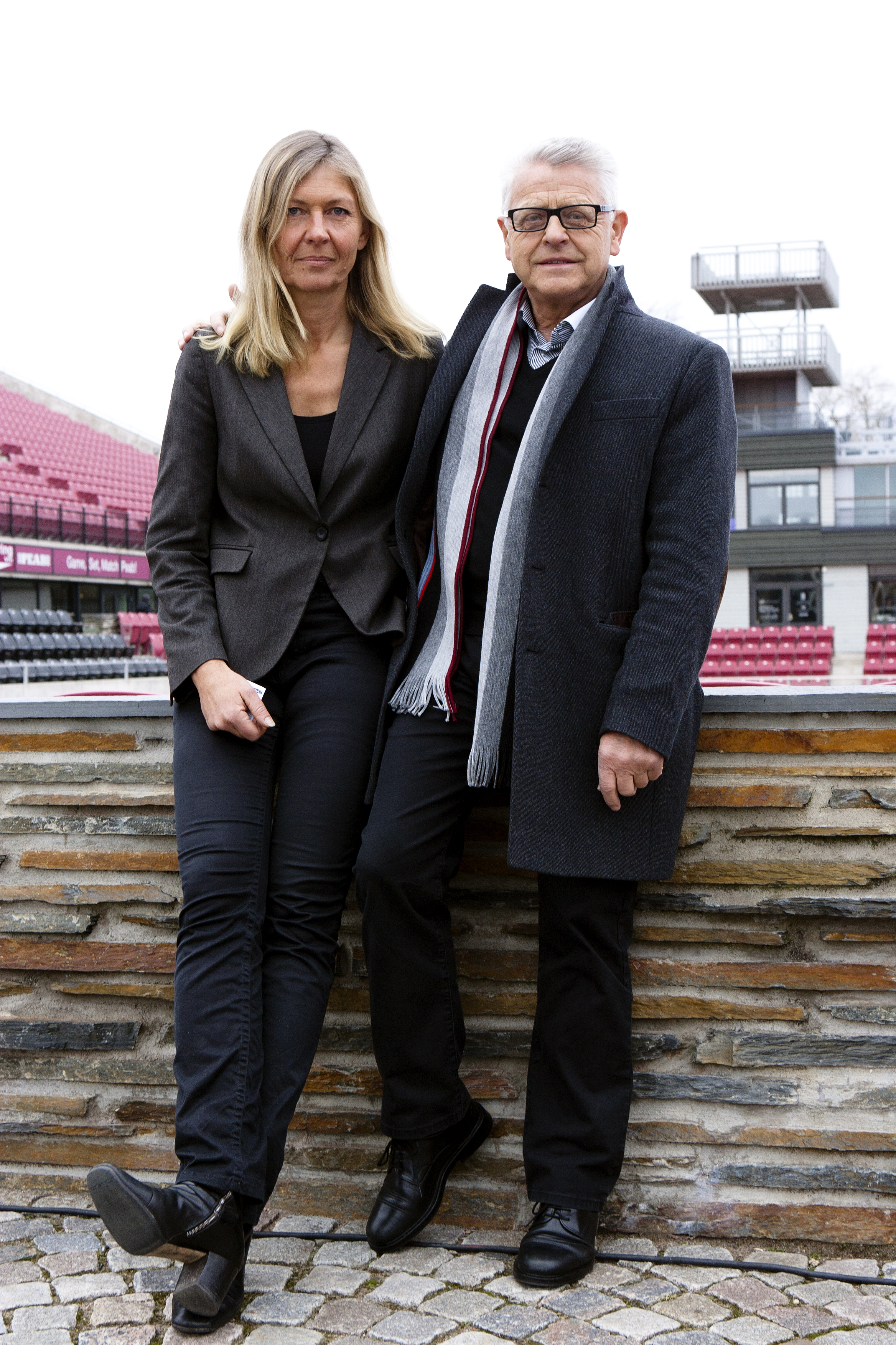 Danske arkitekten Dorte Mandrup och fastighetsmagnaten Erik Paulsson (medgrundare av skånska byggjätten Peab) fotograferade 20110302 vid tennisstadion i Båstad i samband med att de presenterade ett första förslag till hur Norrvikens trädgårdar kan räddas genom att det av Erik Paulsson och fyra medfinansiärer kontrollerade företaget Lilla Båstad AB köper Norrvikens trädgårdar och skapar en anpassad bebyggelse i närheten av trädgården med hotell, bostäder, kontor och en entreprenörsskola. Norrvikens trädgårdar skapades av Rudolf Abelin 1906 och har ägts av en stiftelse som haft stora problem att få anläggningen lönsam. Stiftelsen försattes i konkurs i slutet av 2012. Därefter har Lilla Båstad köpt Norrvikens trädgårdar av konkursboet och tittar nu på hur anläggningen kan räddas genom projekt som förbättrar ekonomin. Utmaningen är att det finns en lokal opinionsbildning mot byggprojekten som skulle ge trädgårsanläggningen bättre ekonomi. Tidigare har Erik Paulssons bror Mats Paulsson försökt rädda Norrvikens trädgårdar via projektbolaget NTAB. Foto: News Øresund – Johan Wessman. © News Øresund. Bilden får fritt publiceras under förutsättning att källa anges. The picture can be used freely under the prerequisite that the source is given. Politics Originalfil tillhandahålles gratis, kontakta: News Øresund, Malmö, Sweden. News Øresund är en oberoende regional nyhetsbyrå som ingår i projektet Øresund Media Platform som drivs av Øresundsinstituttet i partnerskap med Lunds universitet och Roskilde Universitet och med delfinansiering från EU (Interreg IV A Öresund) och 14 regionala, icke kommersiella aktörer.